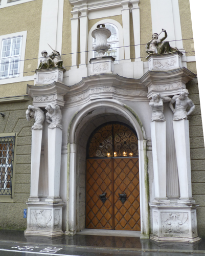 Großes Festspielhaus (Salzburg) Nordportal